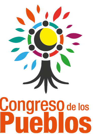 Imagen Oficial del Movimiento Político y Social Congreso de los Pueblos